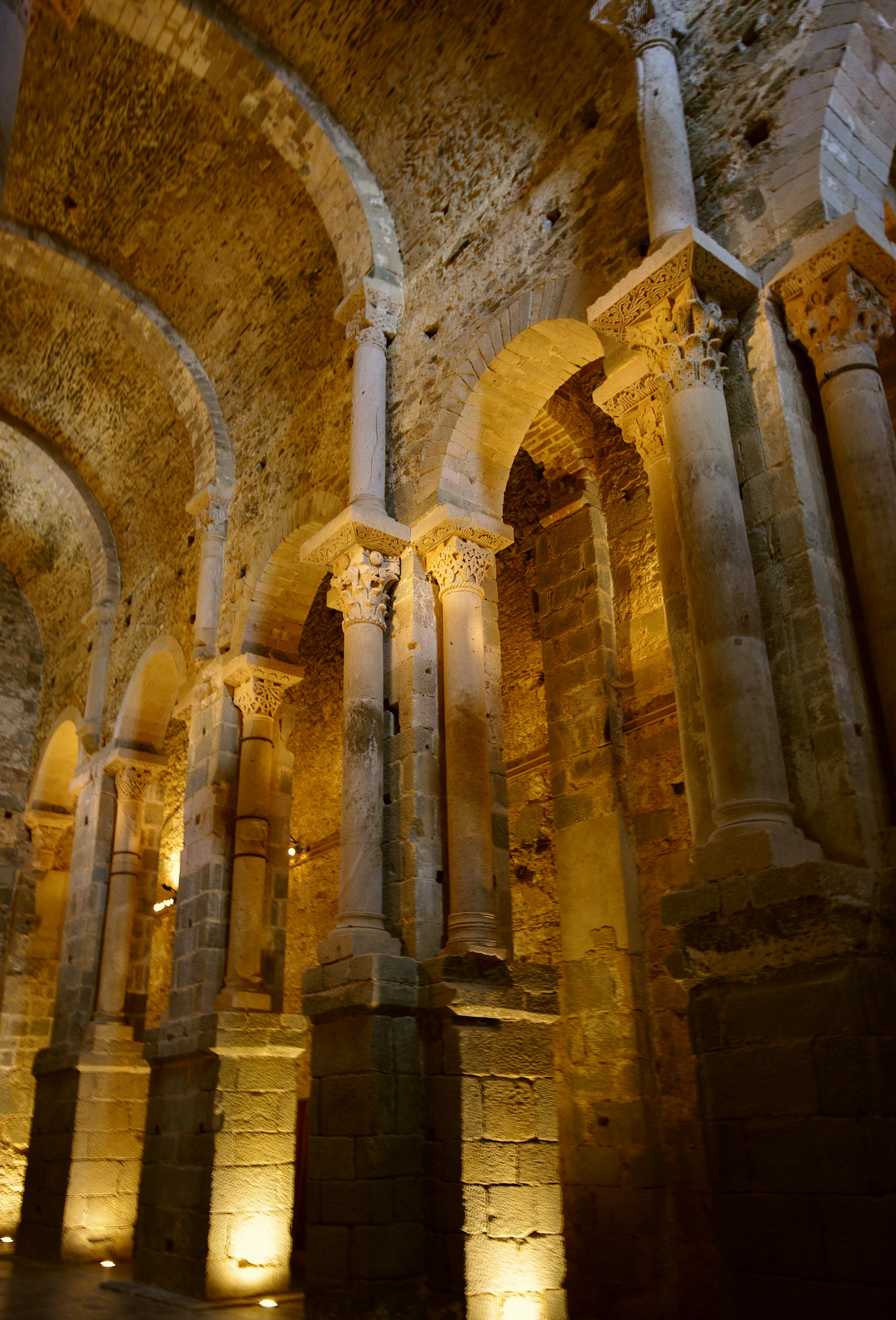 Monestir de Sant Pere de Rodes (El Port de la Selva)